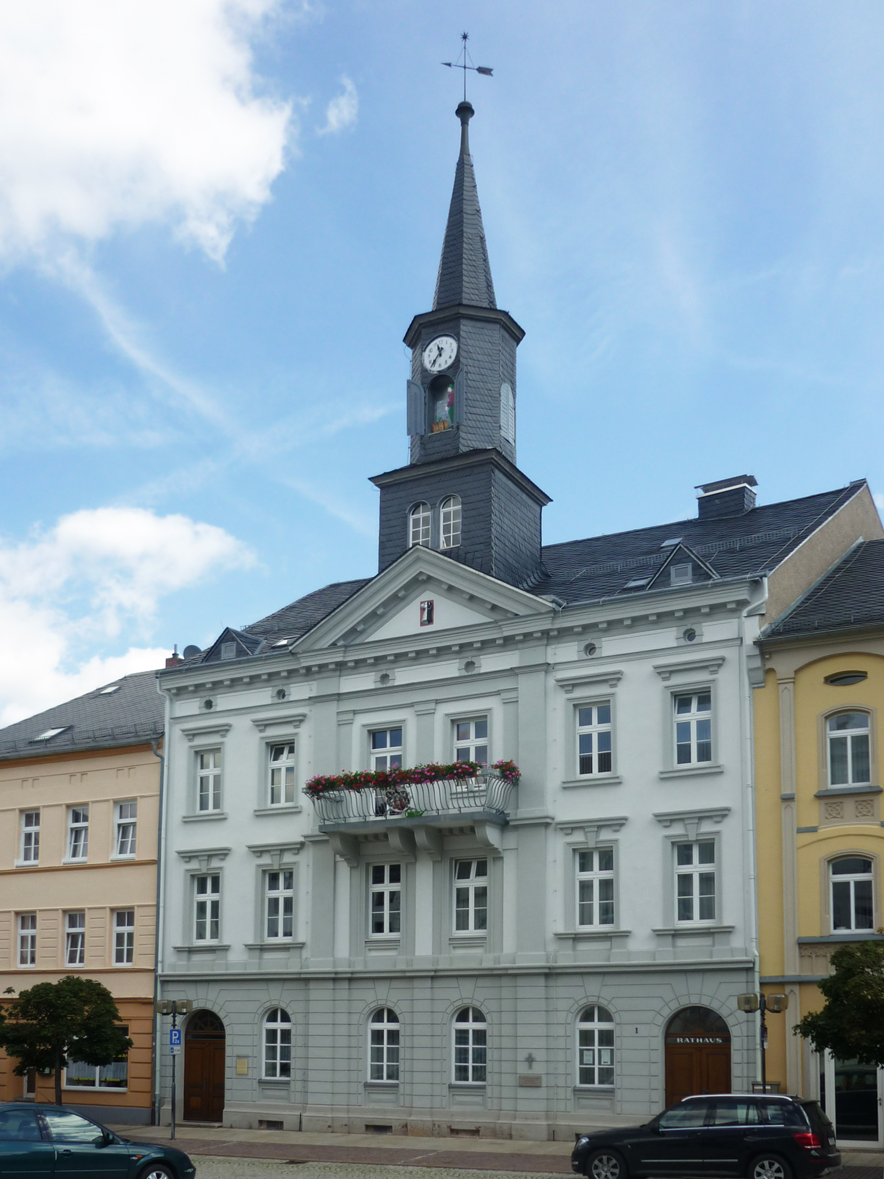 Rathaus in Lobenstein (Thür.)